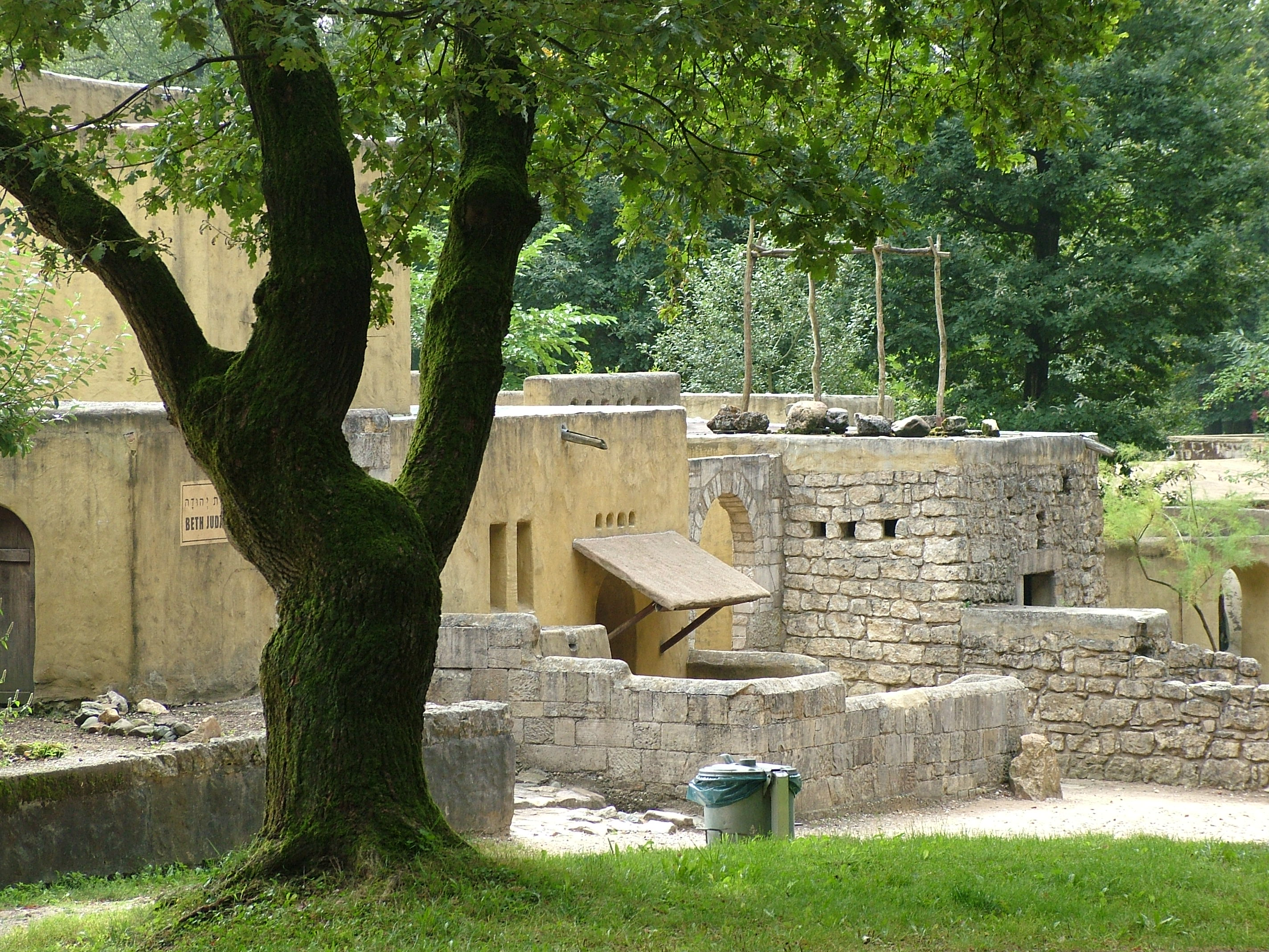 Museumpark Orientalis bij Nijmegen. Joods dorp